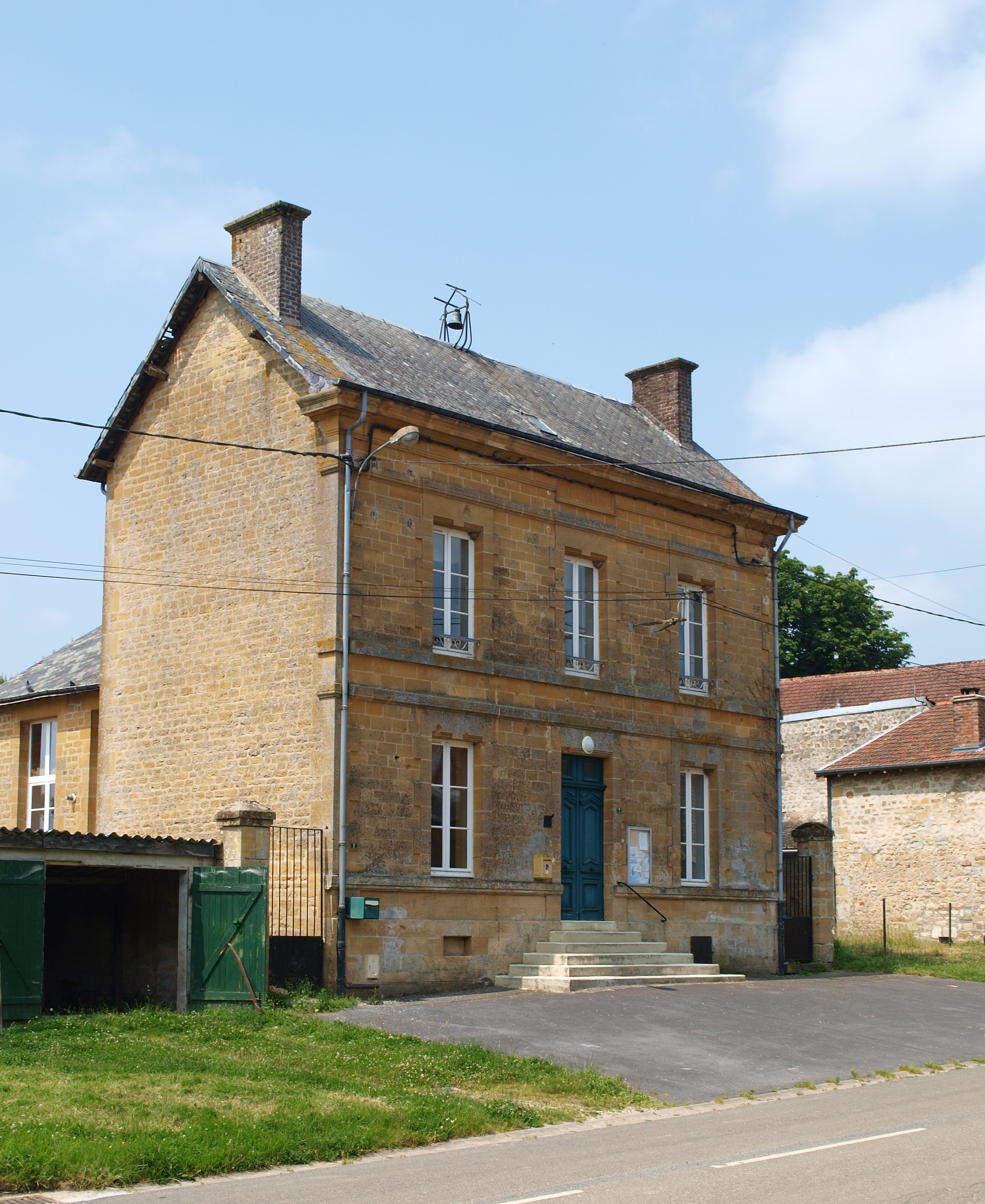 Verrières (Ardennes, France) , mairie